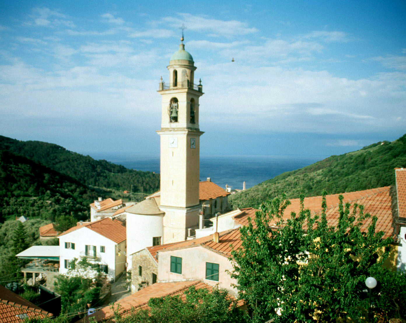 Moneglia 2004